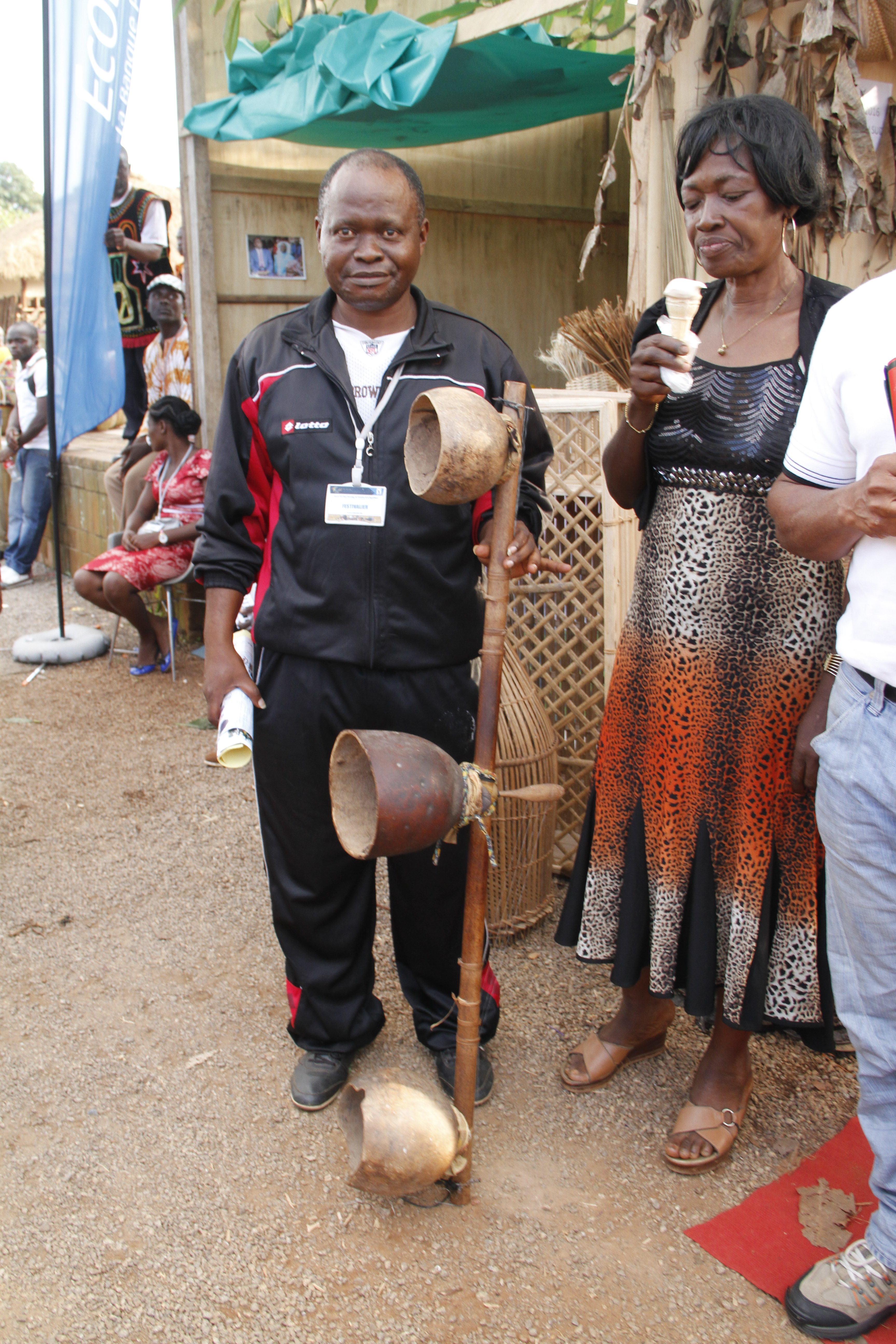 Présentation d'une guitare traditionnelle lors du Fenac (Festival National des Arts et de la Culture) à Yaoundé au Cameroun This is an image from Cameroon